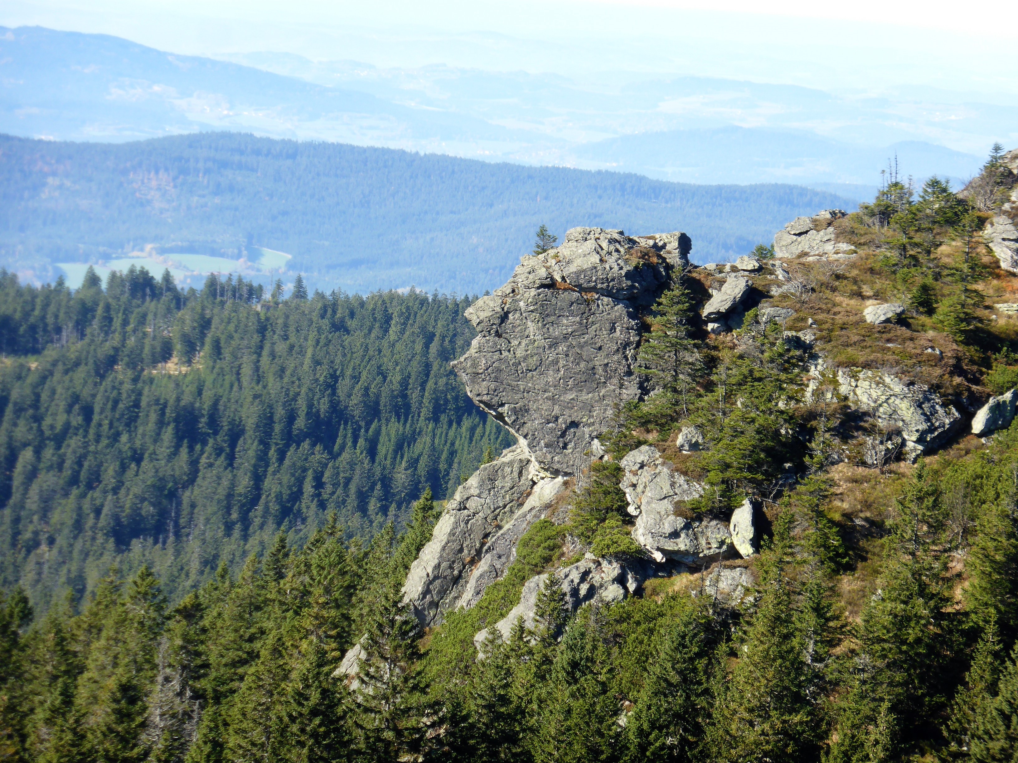 Blick auf den Richard-Wagner-Kopf am Gipfel des Großen Arber; Landkreis Regen. Geotop im Landkreis Regen mit der Nr. 276R014.